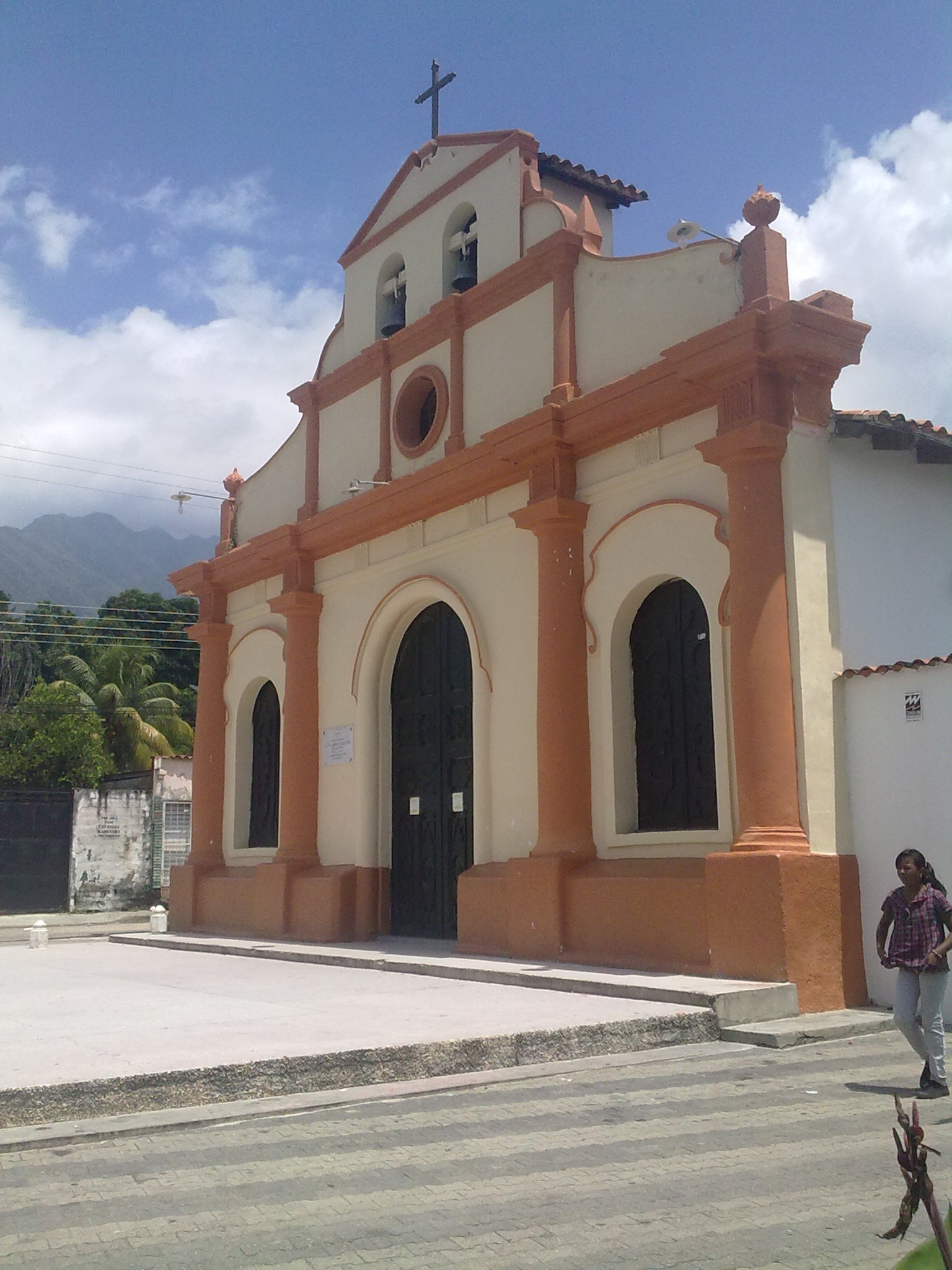 Kirche in Mariara, Venezuela.